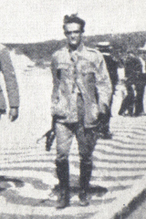 Revolta dos 18 do Forte de Copacabana: da esquerda para direita, tenentes Eduardo Gomes, Siqueira Campos, Nílton Prado e o civil Otávio Correia